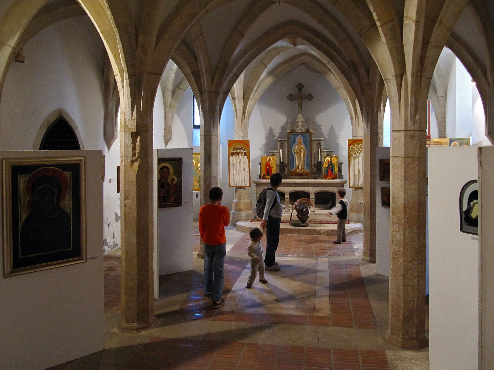 Székesegyház (Veszprém, Vár u.) This is a photo of a monument in Hungary, Identifier: 10682